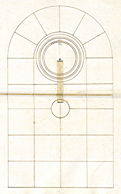 Bauzeichnung der Normaluhr Berlin